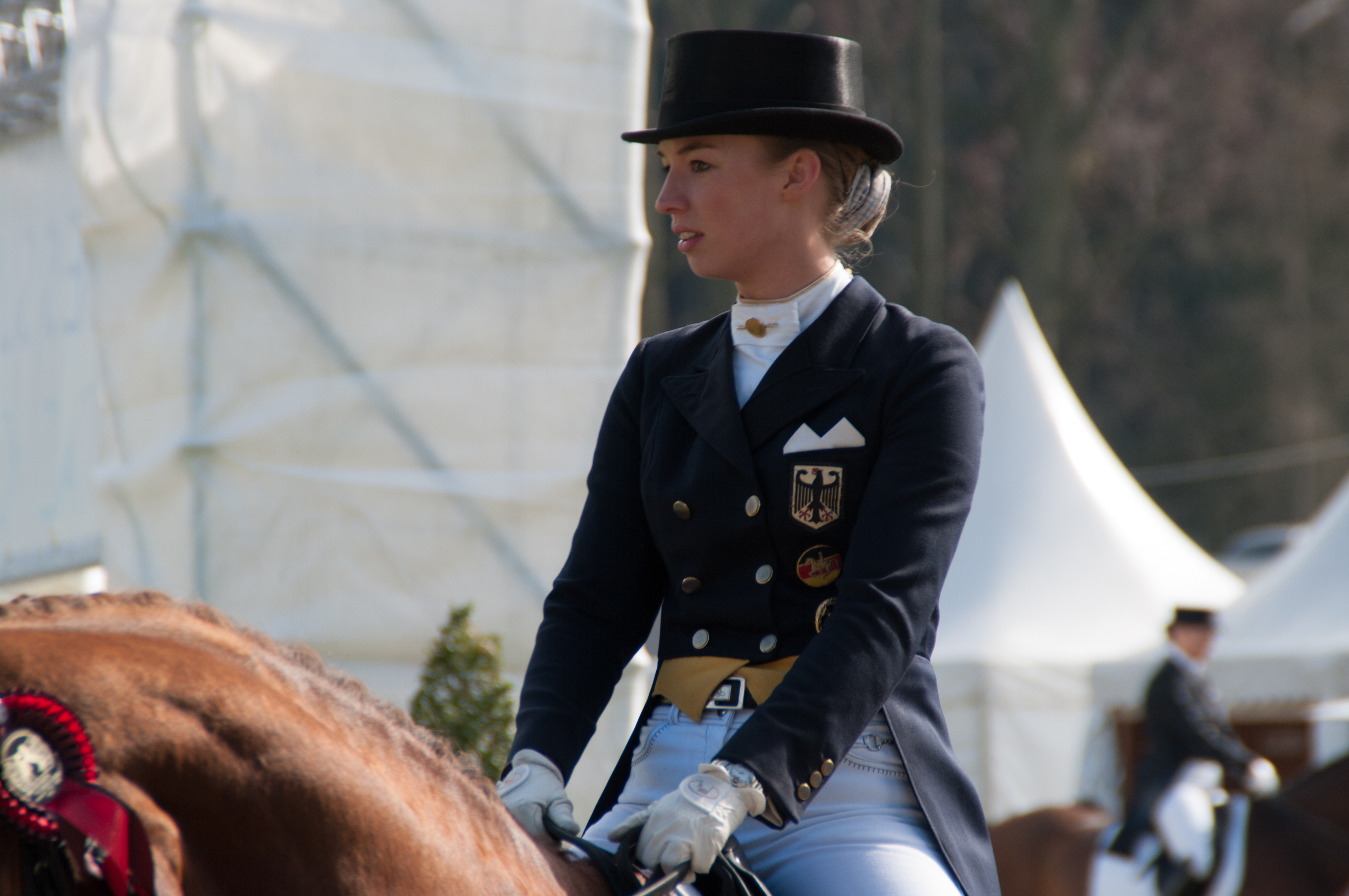 Horses & Dreams 2013: Fabienne Lütkemeier